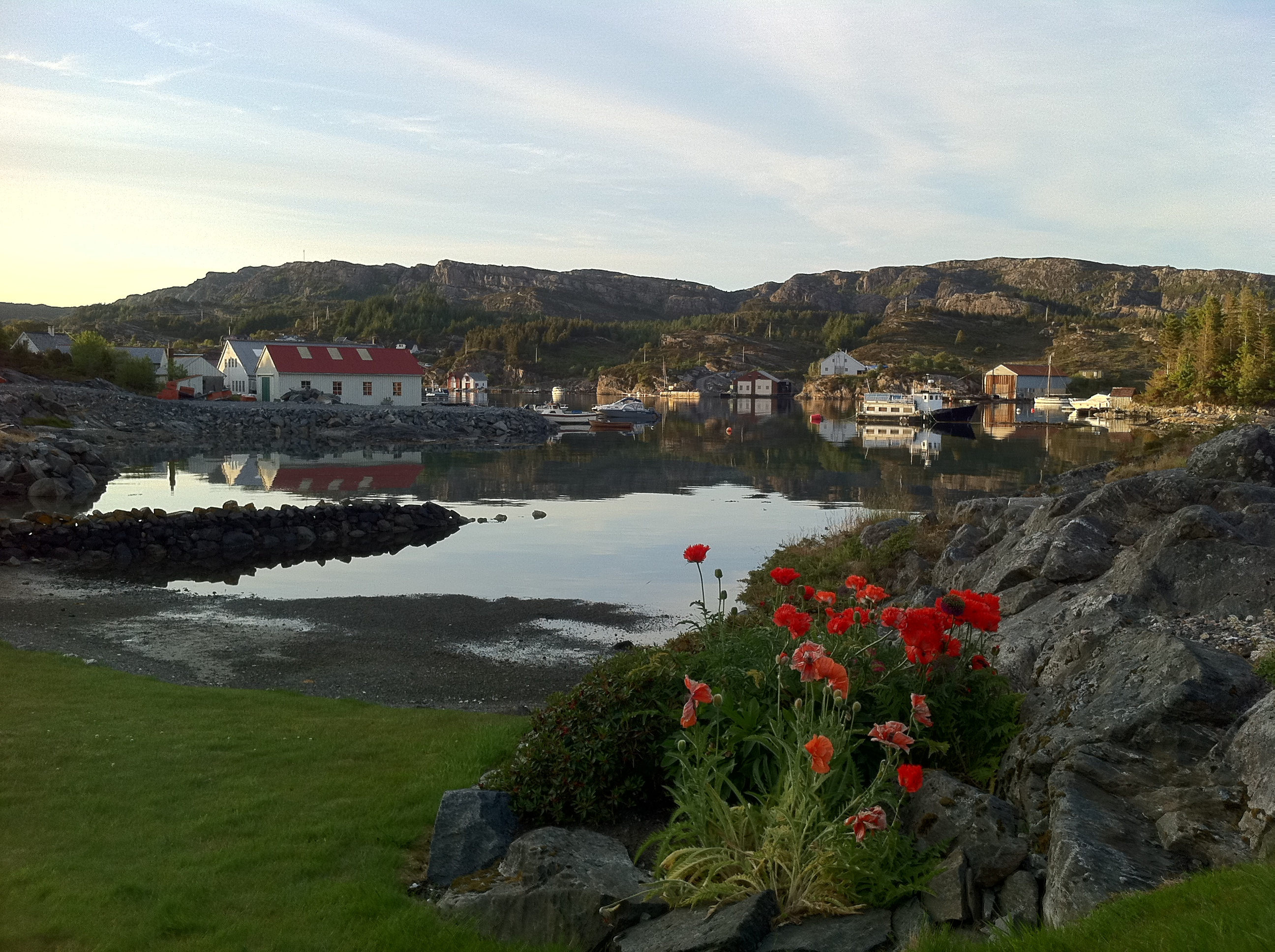 Forlandsvåg